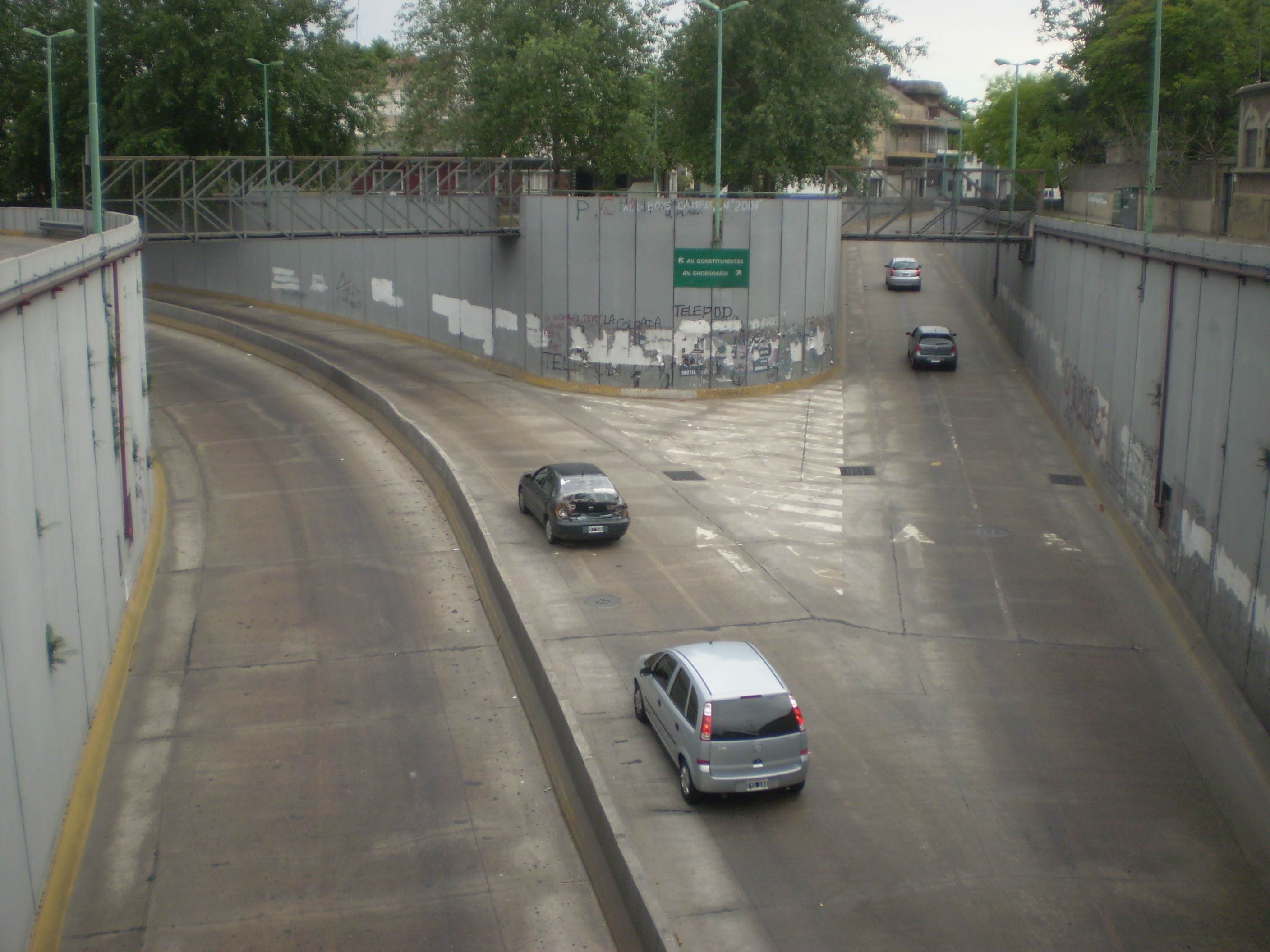 Vista desde arriba del túnel Chorroarín - Constituyentes en la ciudad de Buenos Aires.